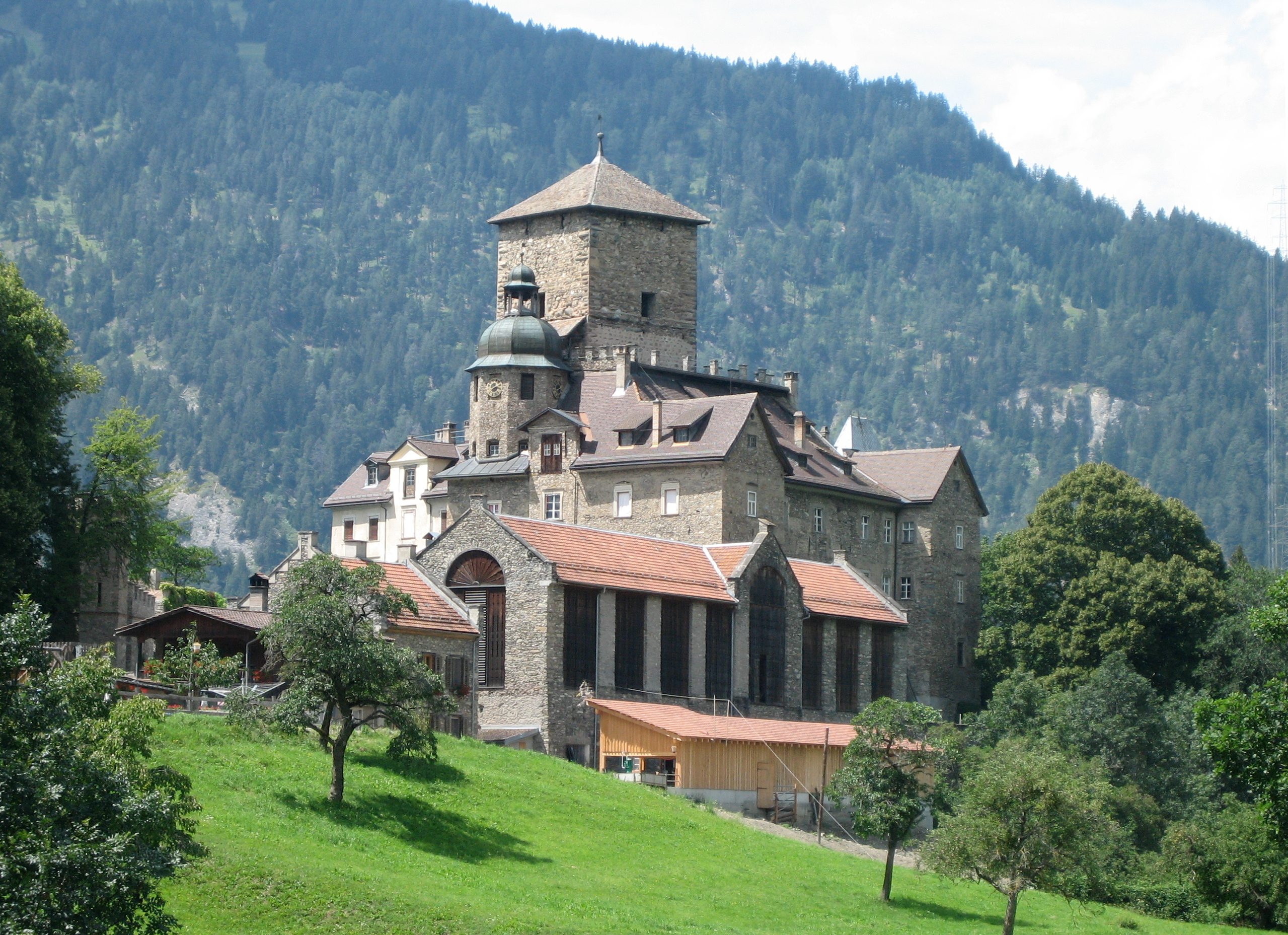 Schloss Ortenstein von Südosten